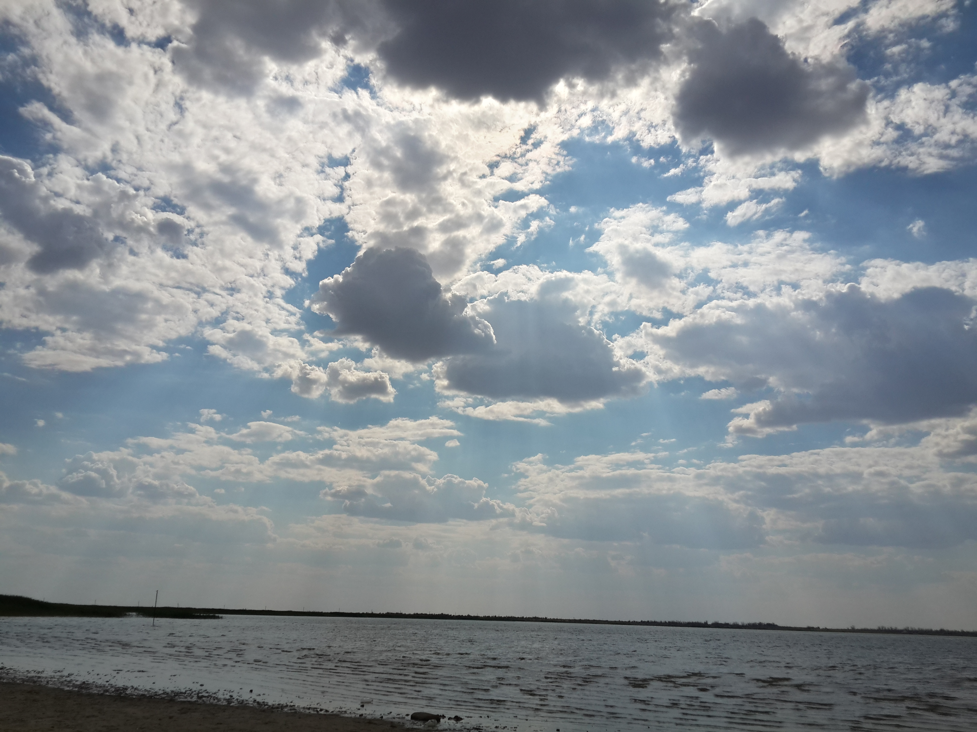 Озеро Шалкар, Актюбинская область, Шалкарский район